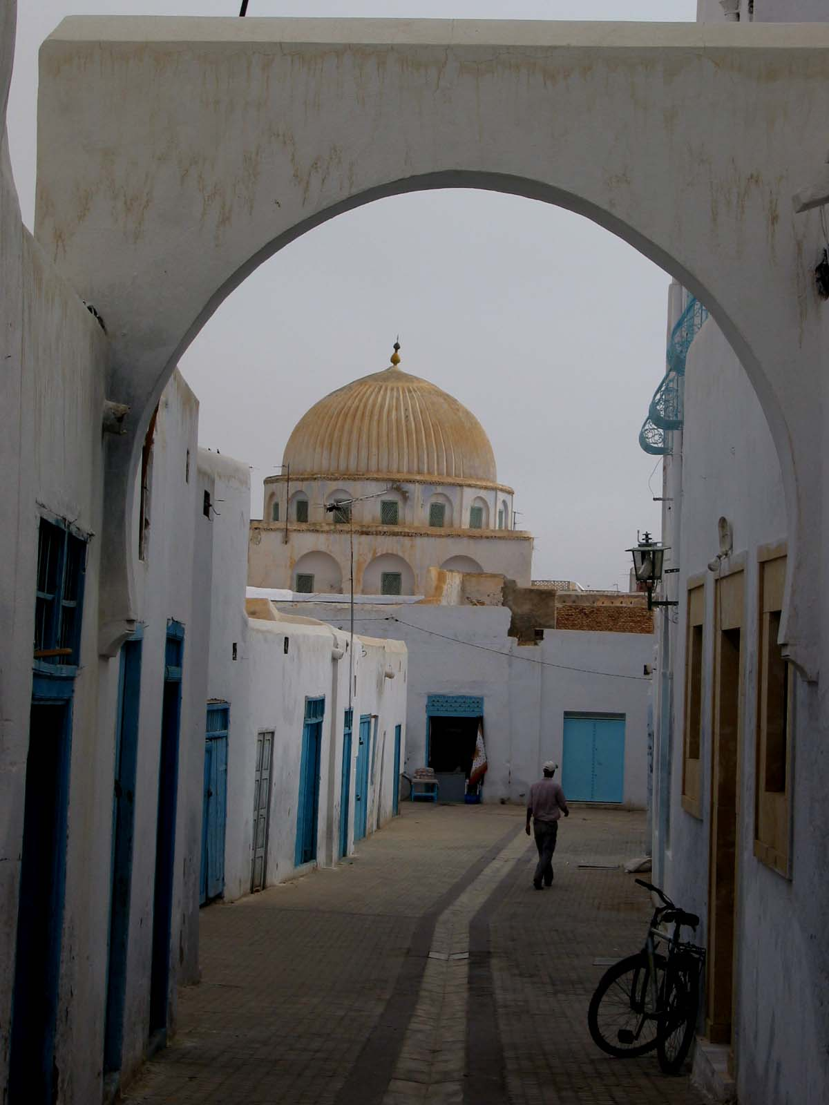 Kairouan, Tunisia